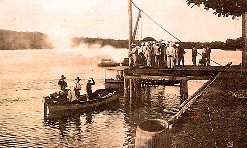 Relégation des récidivistes en 1885 à Saint-Jean-de-Maroni